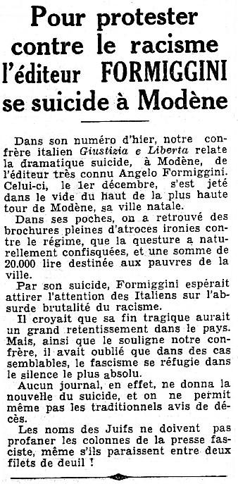 Annonce du suicide d'Angelo Fortunato Formiggini parue dans Le Populaire du 10 décembre 1938, page 3, 2ème colonne. Information reprise du journal antifasciste italien Giustizia e Libertà du 9 décembre 1938.